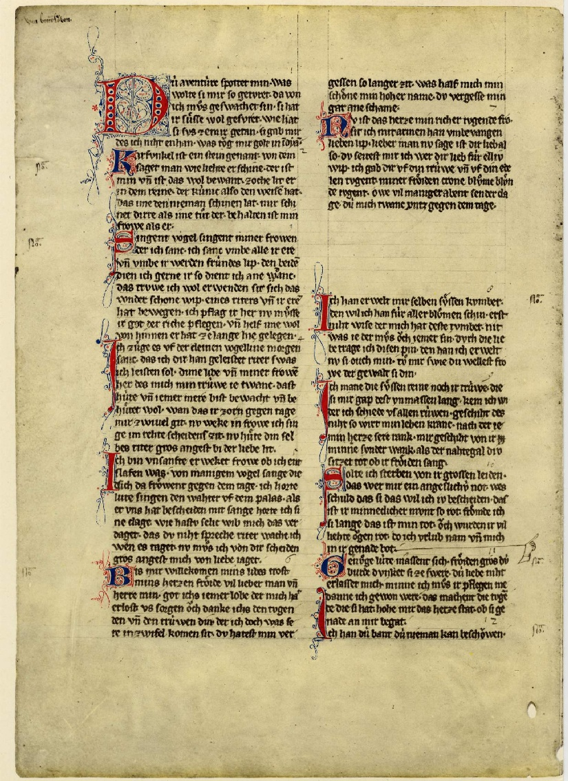 folio 27v des Codex Manesse (cpg 848), Otto von Botenlauben